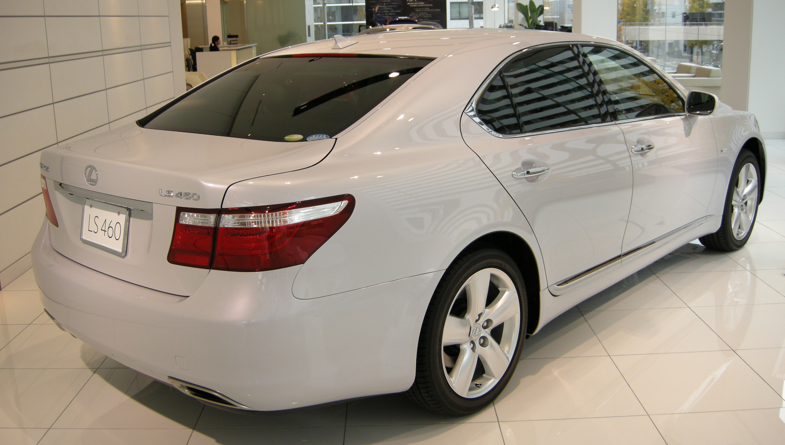 Lexus LS460 in Lexus Gallery Takanawa (Minato, Tokyo)